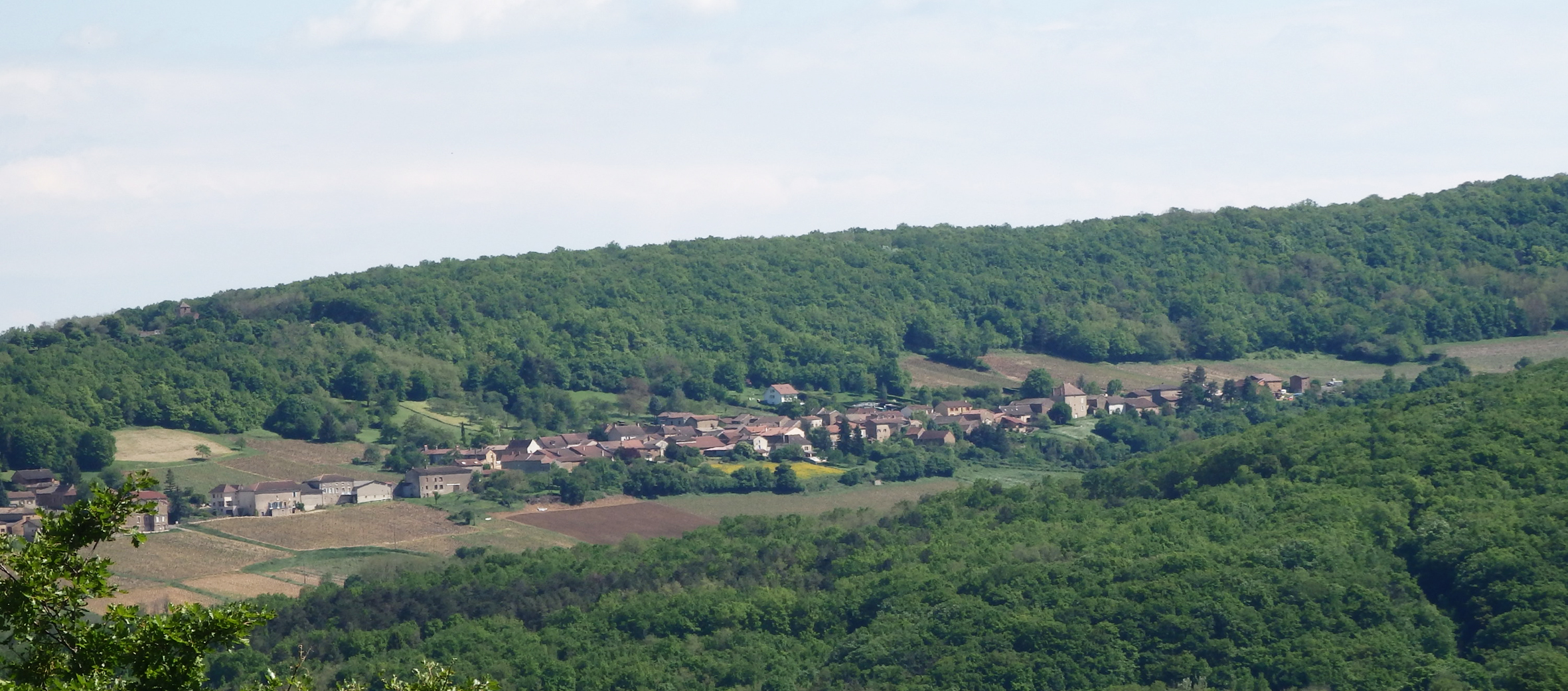 Vue générale de Burgy, depuis le site naturel protégé de La Boucherette (Lugny)